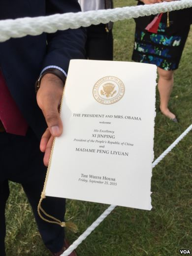 白宫邀请中国国家主席习近平国事访问的请帖